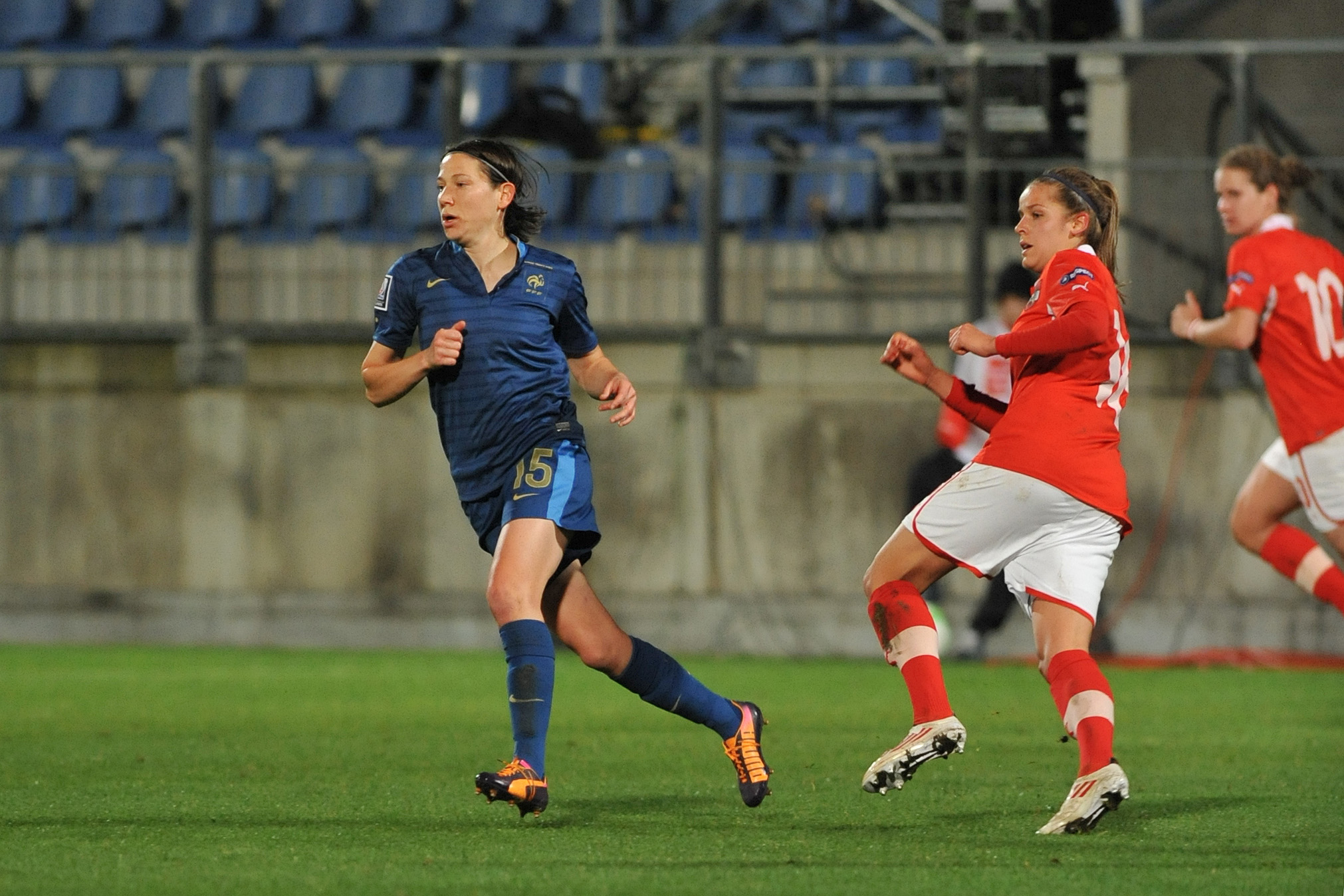 FIFA Women's World Cup 2015 Qualiying Round Österreich - Frankreich am 31. Oktober 2013 in Ritzing: Élise Bussaglia